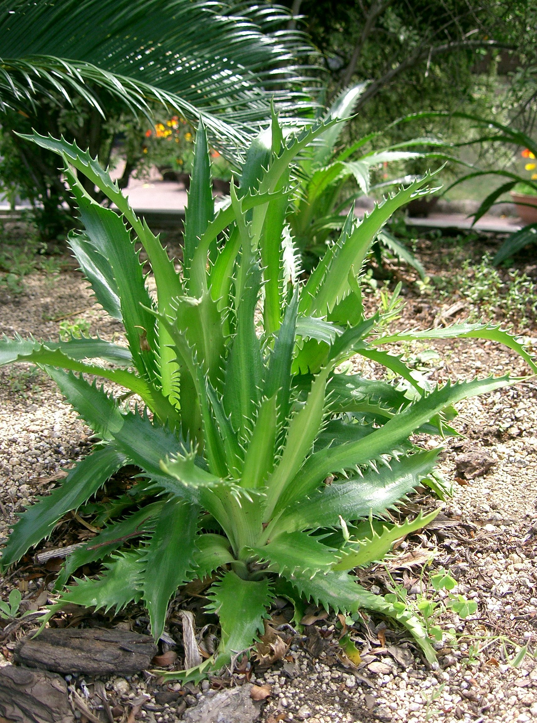 Eryngium agavifolium